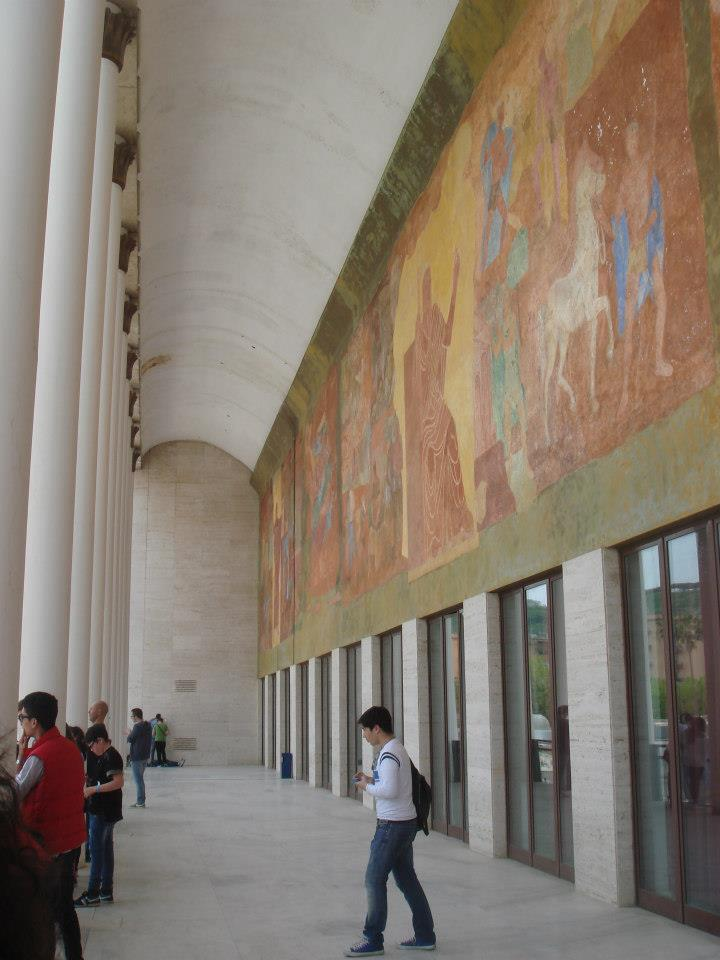 autore: Salvatore Architravo / ARCHIsavio.